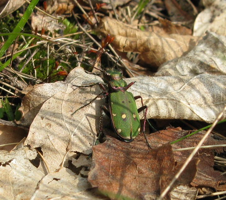 Svižník polní. Lokalita výskytu: Mírovská vrchovina (k.ú. Mírov)